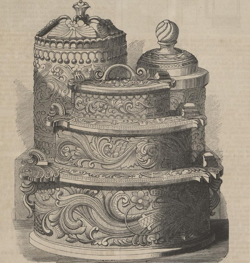 En treetasjers tine laget av Hølje Gonge. Denne ble utstilt på Verdensutstillingen i London i 1851, der den vant andrepremie.